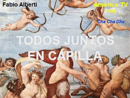 Infografía para TV Argentina. Peperino Pómoro.